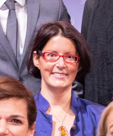 _PH_2364